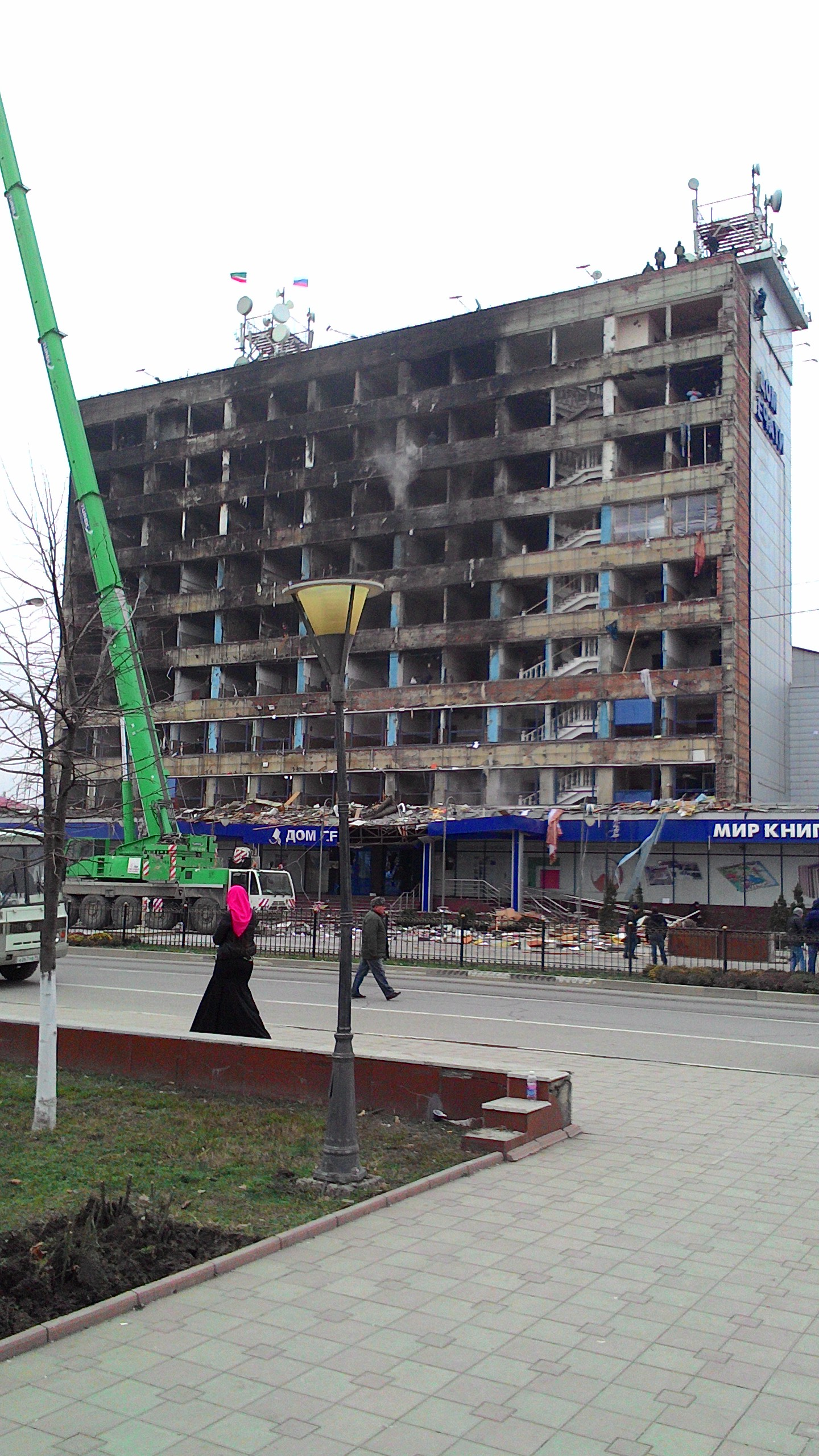 Дом печати в Грозном